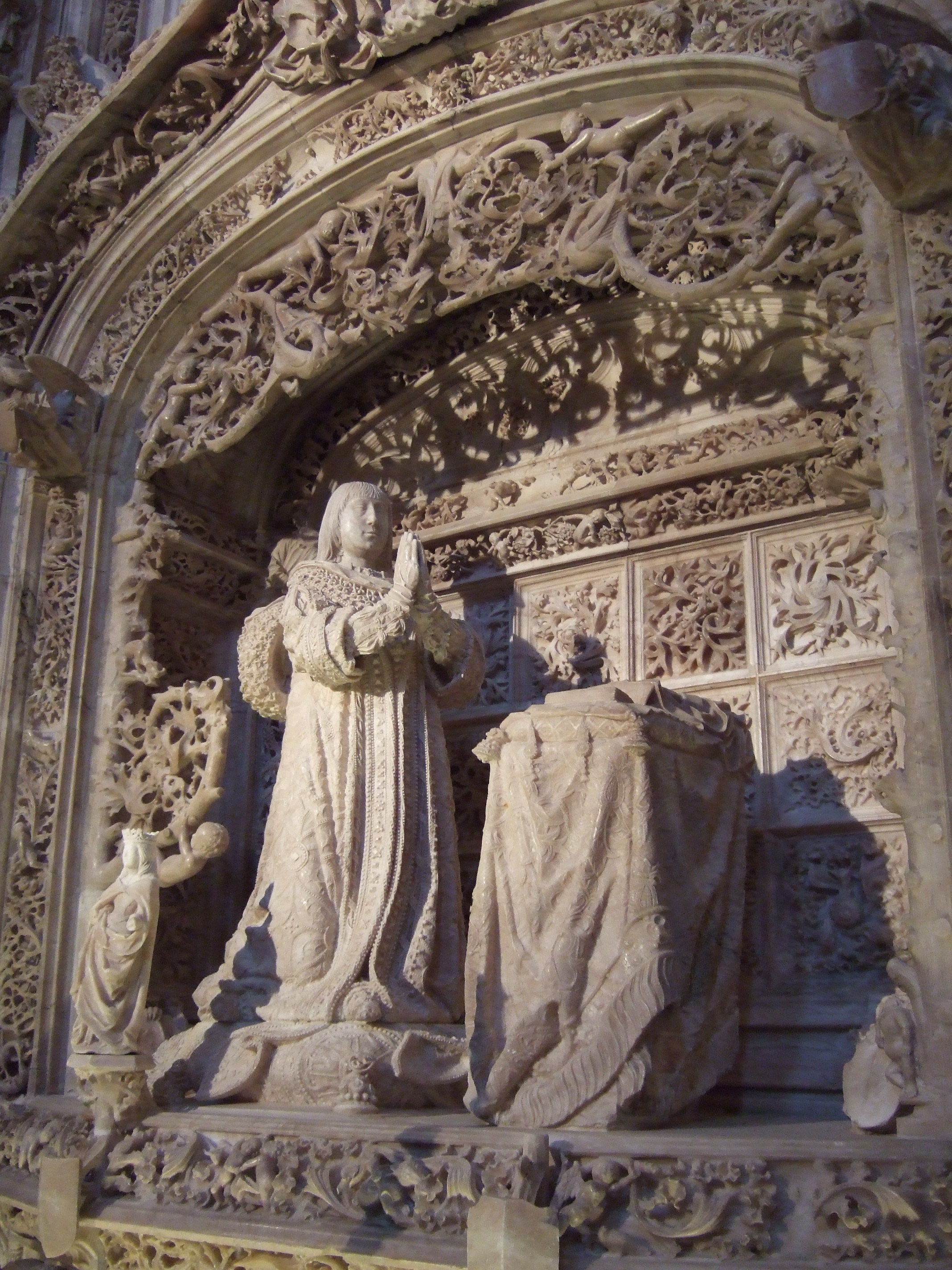 Tumba de Alfonso de Castilla, hermano de Isabel la Católica, en la Cartuja de Miraflores (Burgos); obras realizadas por Gil de Siloé, s. XV